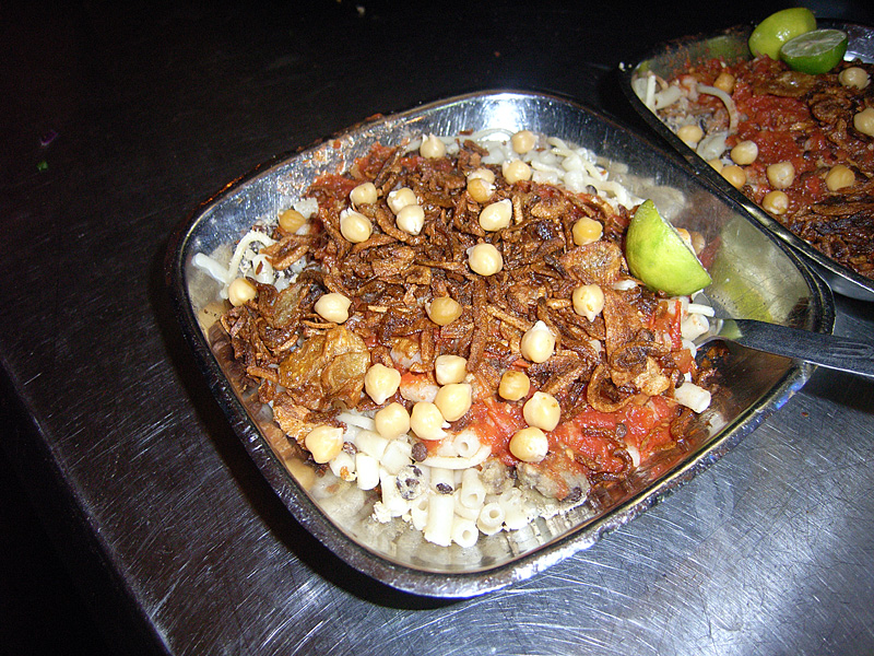 Koscheri servierfertig